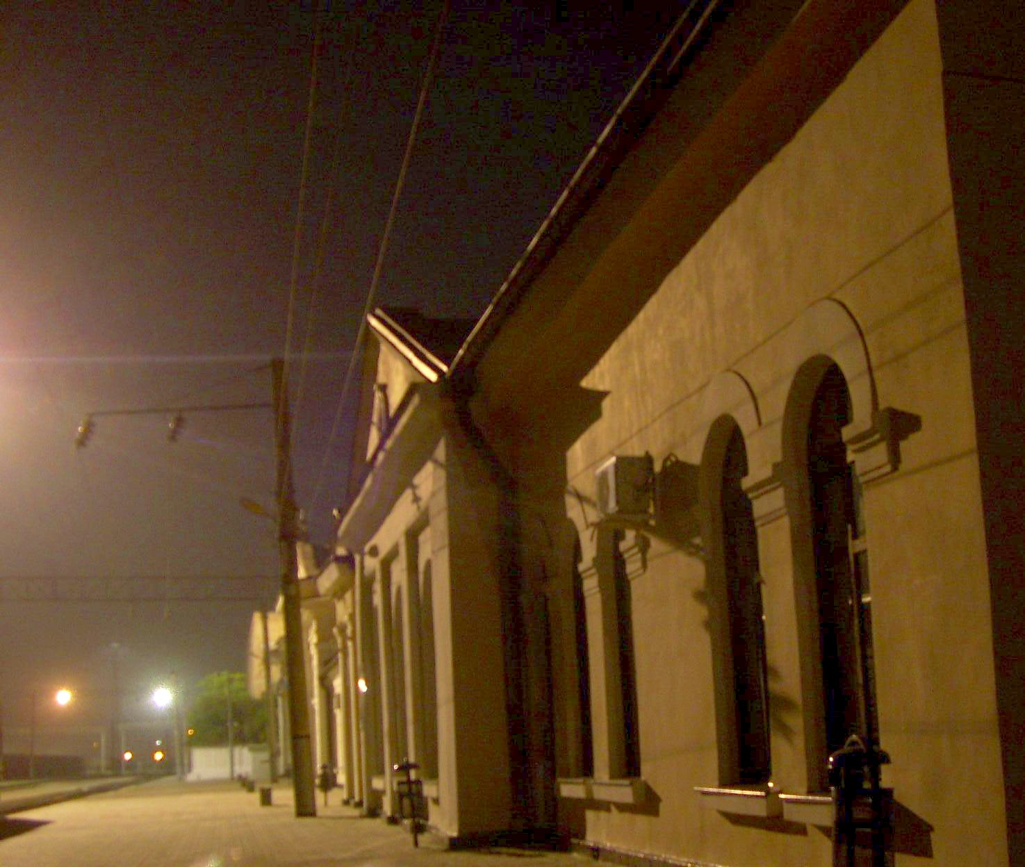 Вокзал на станции Грозный. Вид со стороны путей. 2011 год